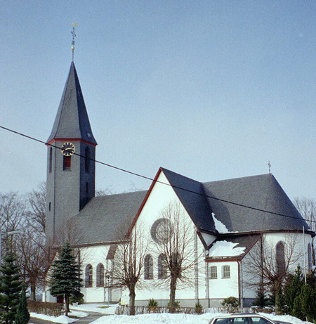 Kath. St. Anna Kirche in Belmicke. Aufgenommen mit: Canon F1